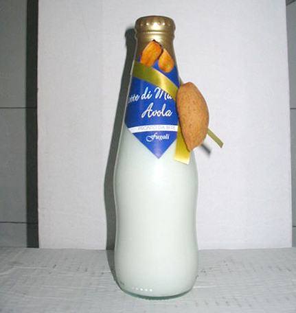 latte di mandorla in bottiglia di vetro, bottiglia sottovuoto cl. 25 o cl. 100 solo mandorla acqua e zucchero